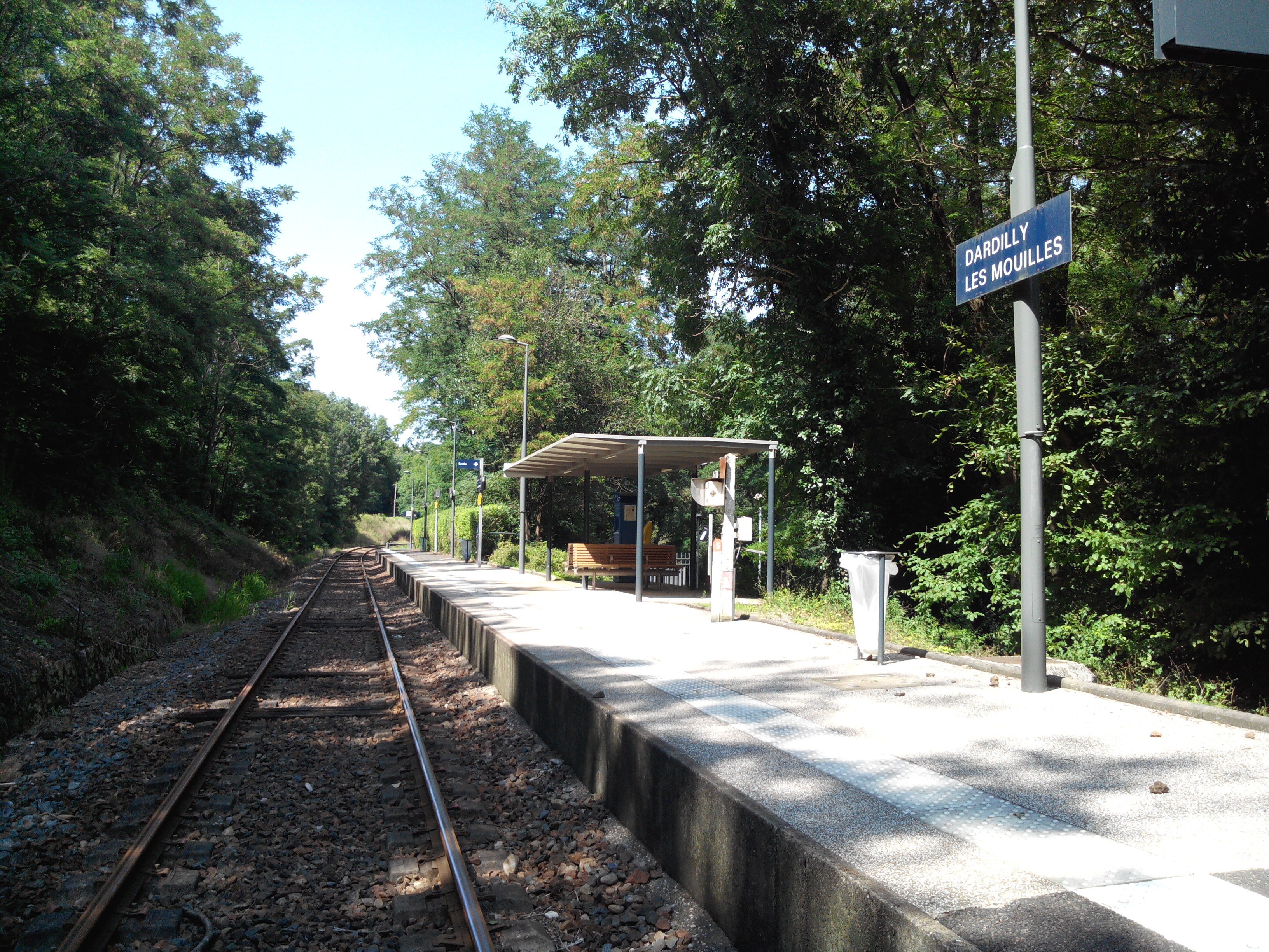 Gare de Dardilly-les-Mouilles en 2014.